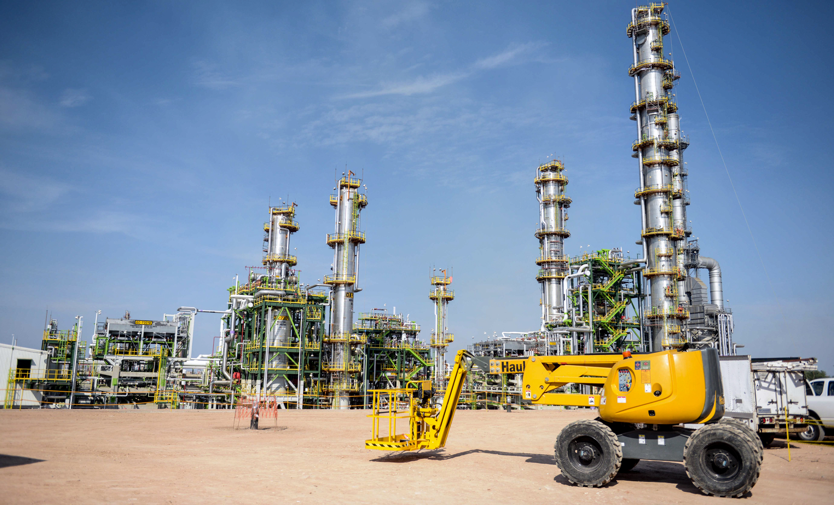 Tula Refinery in Hidalgo, Mexico.